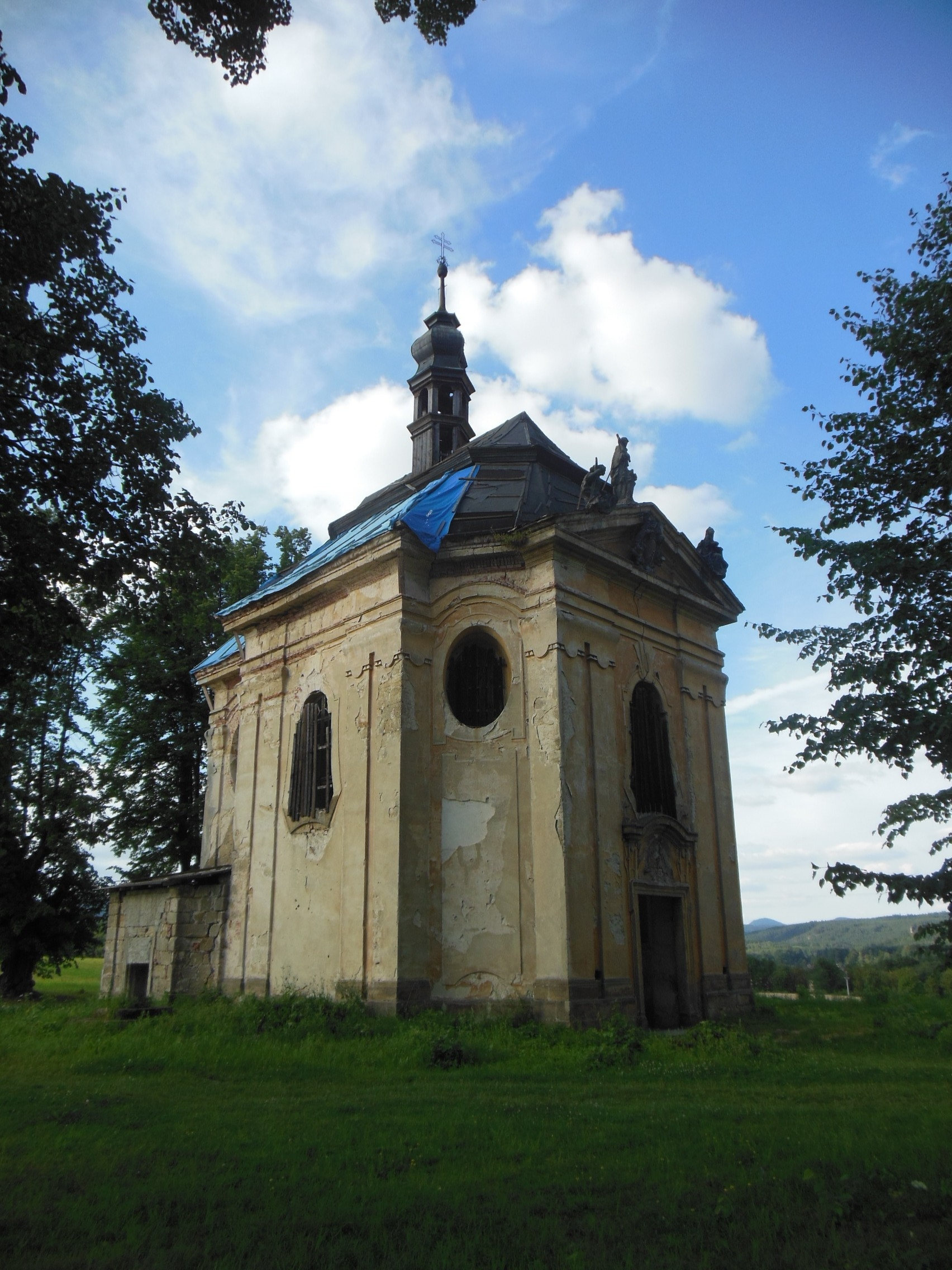 Sloup v Čechách (okres Česká Lípa). Ulice Novoborská, kaple svatého Jana Nepomuckého.